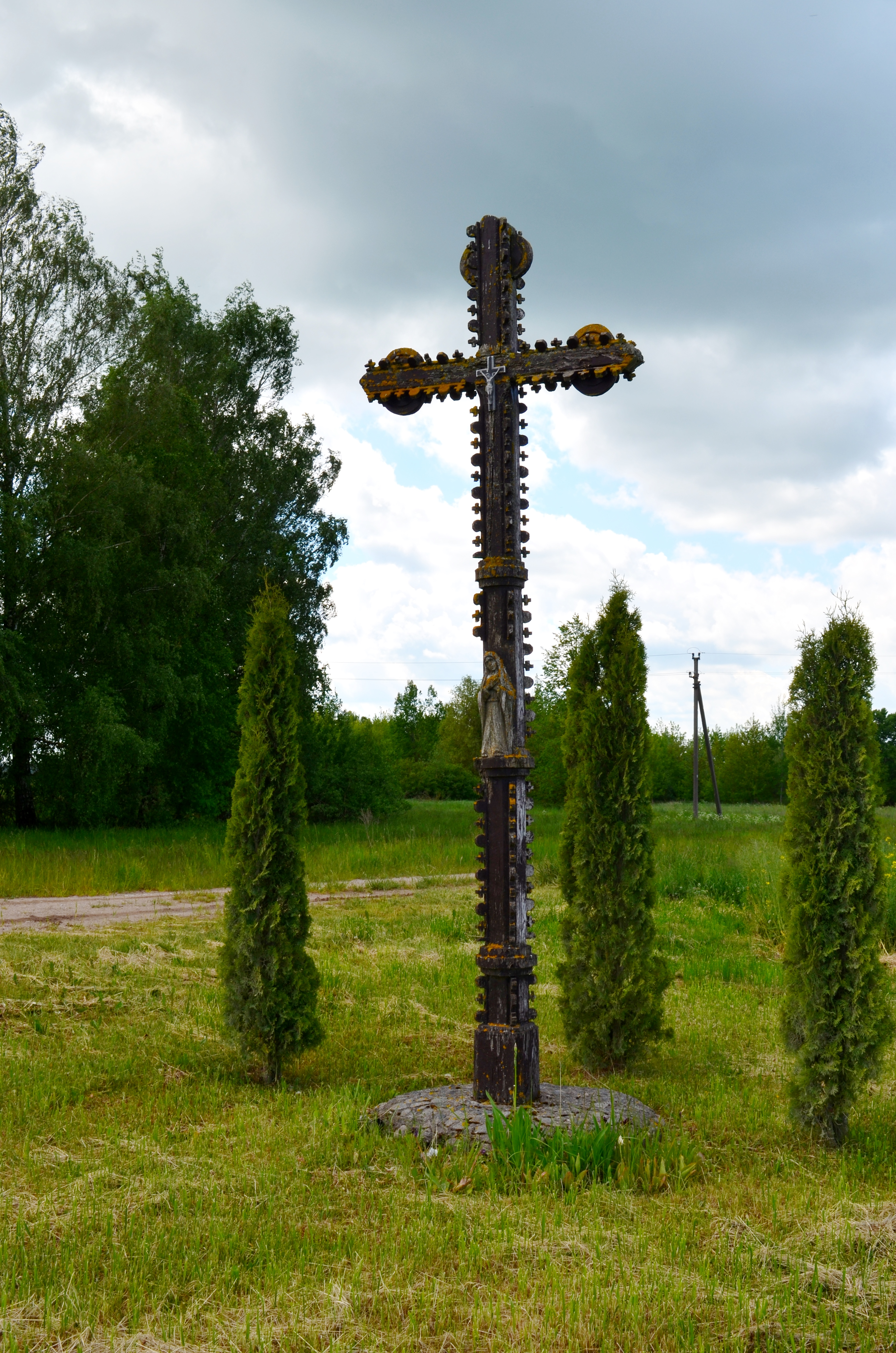 Kryžius, Kunigiškiai, Raguvos sen., Panevėžio raj.